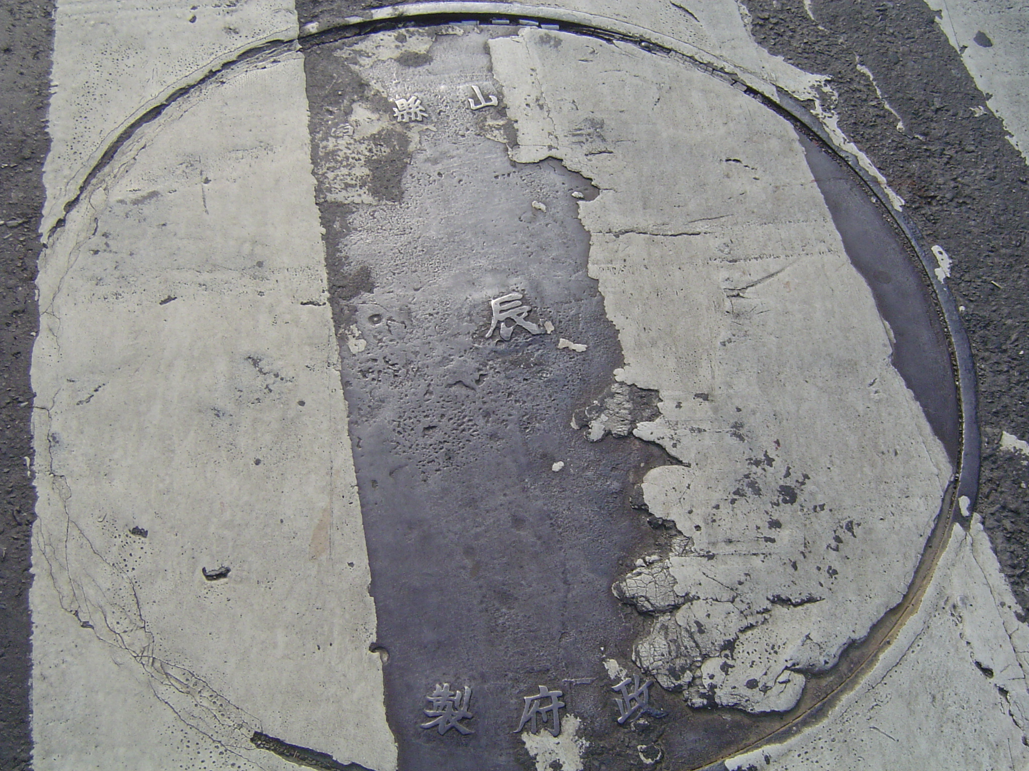 中文（台灣）: 高雄市左營區鳳山縣舊城北門拱辰井跡，位於路口，要在川流不息的車潮中拍攝此照片極其困難。